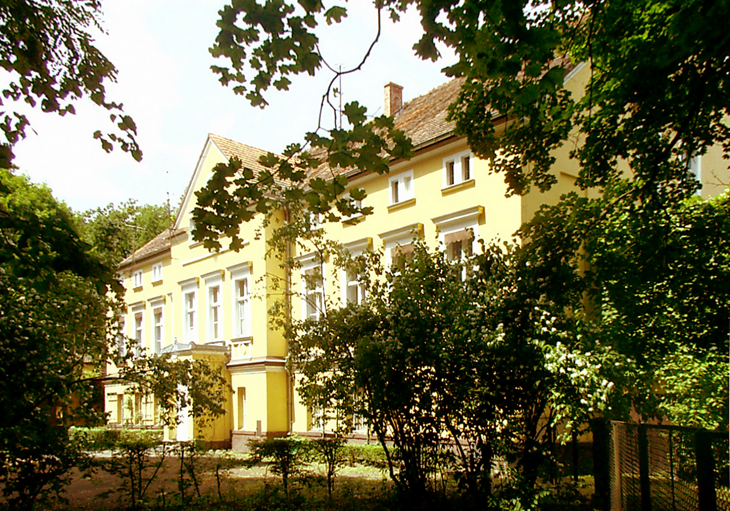 Sieraków, dyrekcja Sierakowskiego Stada Ogierów